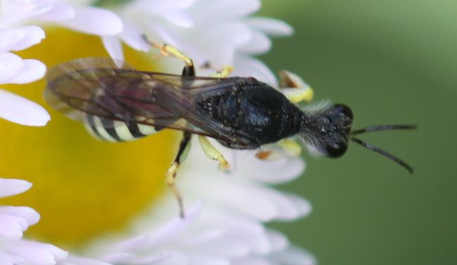 Grabwespe Lestica clypeata, Männchen, am 2. Juni 2018 in der Schwetzinger Hardt